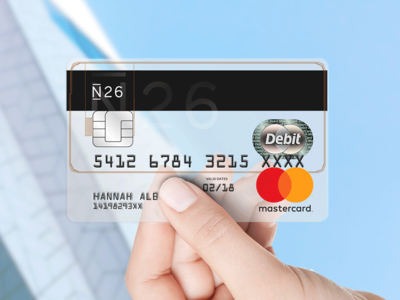 Platobná karta banky N26